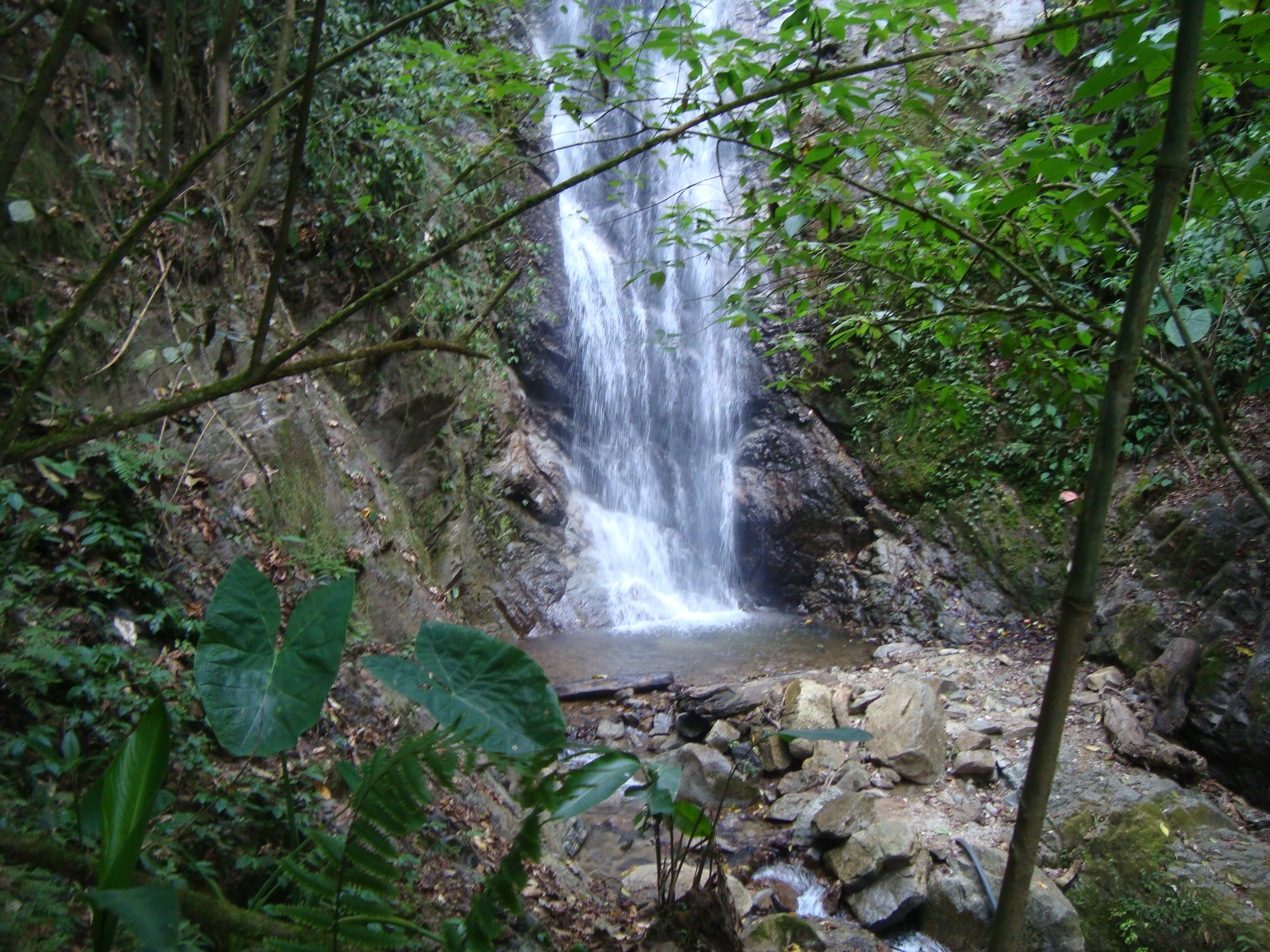 Cascada de el Jardin